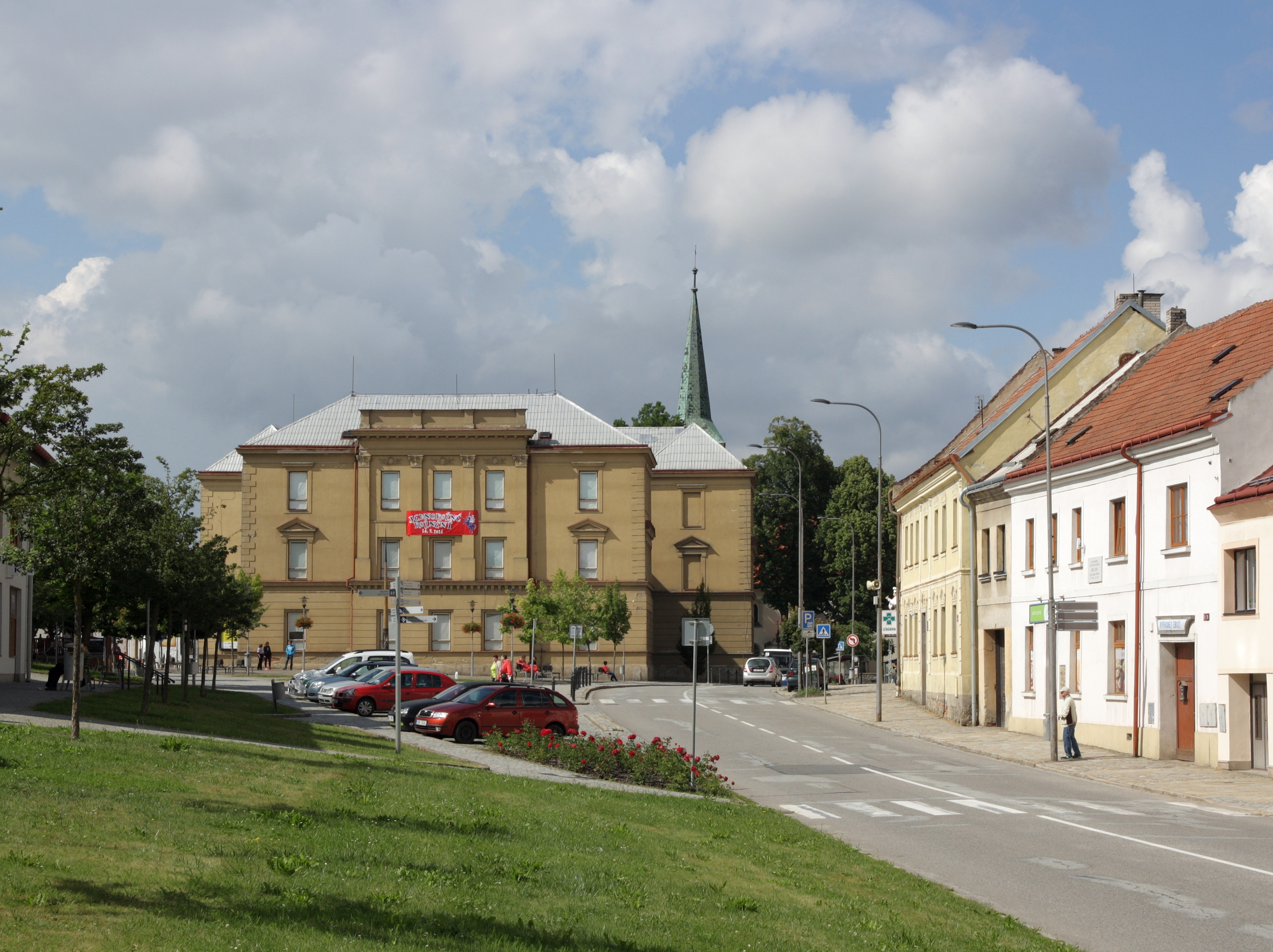 Třešť - náměstí TGM